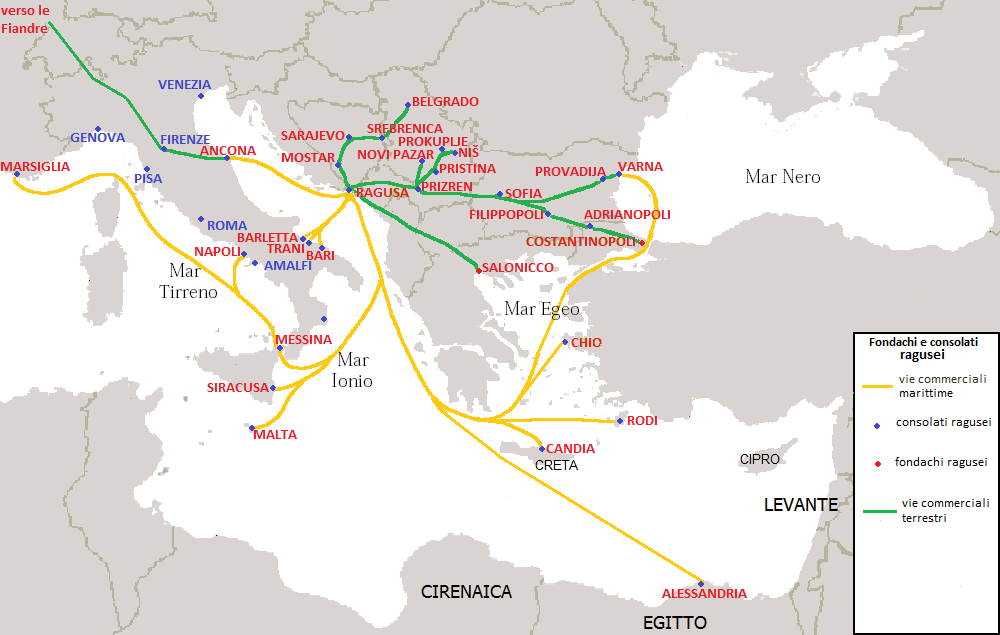 La carta geografica mostra le città in cui la Repubblica di Ragusa ebbe consoli e quelle in cui ebbe anche fondachi. Fonte delle notizie: Io Adritico, Motta Editore, Milano 2001